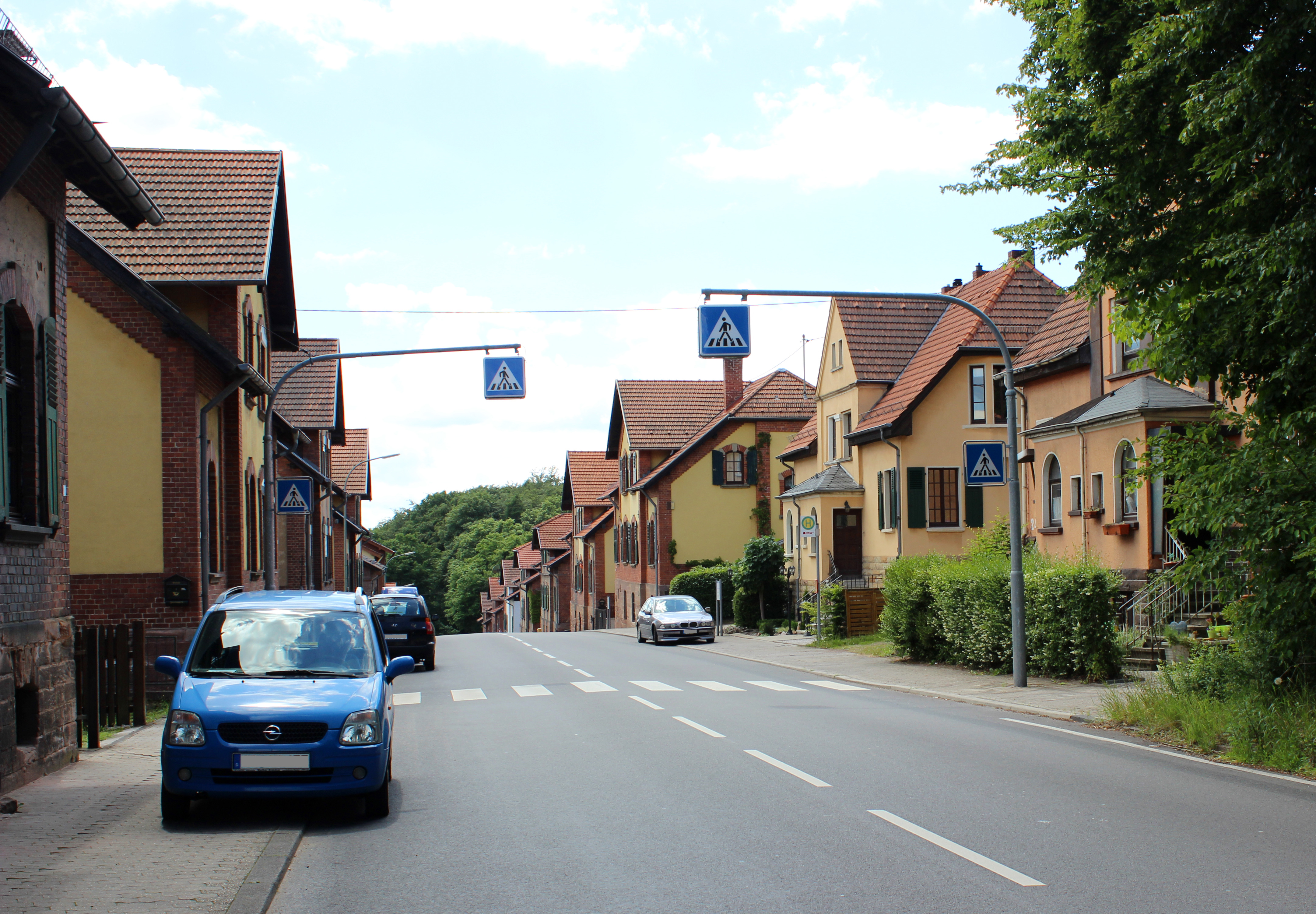 Maybach, Stadt Friedrichsthal, Saarland